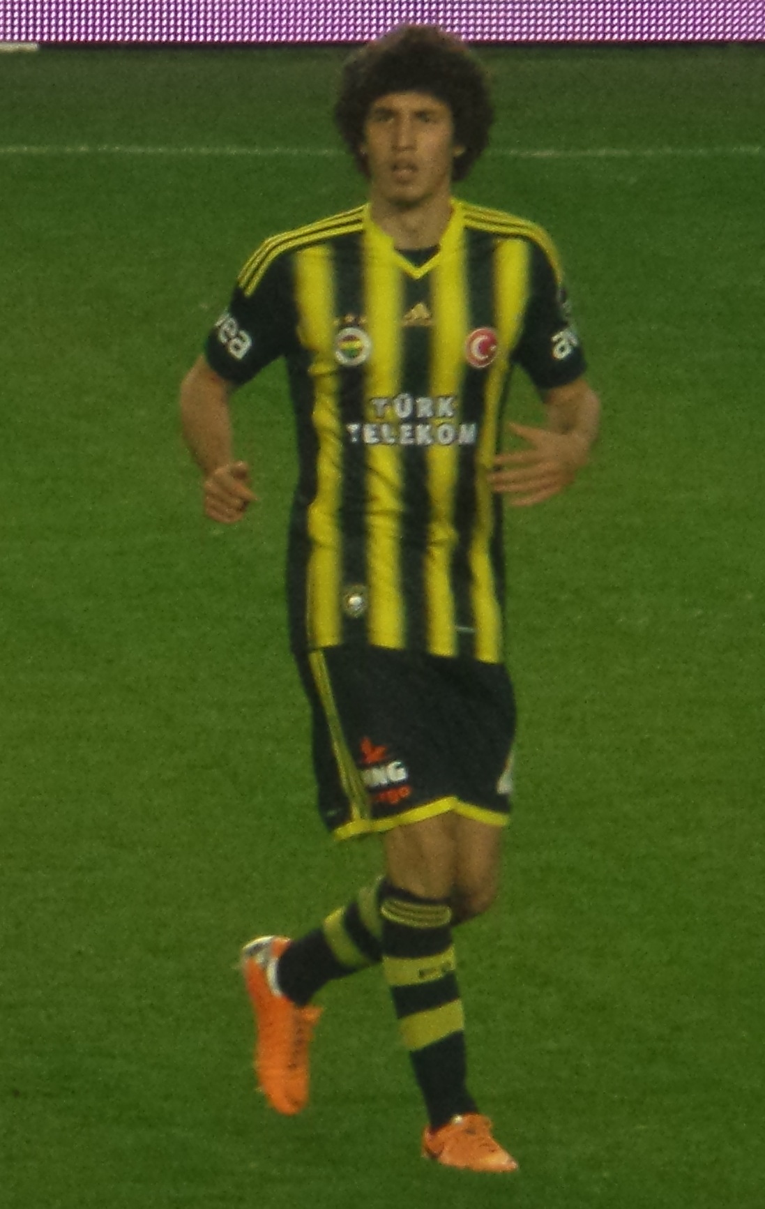 Salih Uçan